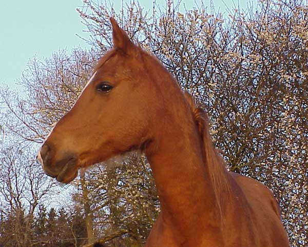 Porträt des fuchsfarbenen Shagy-Arabers Aladin Quelle: fotografiert von Monika Kind (Rickenbach) am 14.April 2004 in Schevenhütte bei Aachen (Deutschland)